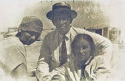 רחל המשוררת בלובשטיין עם חבריה יצחק ושולמית קלוגאי